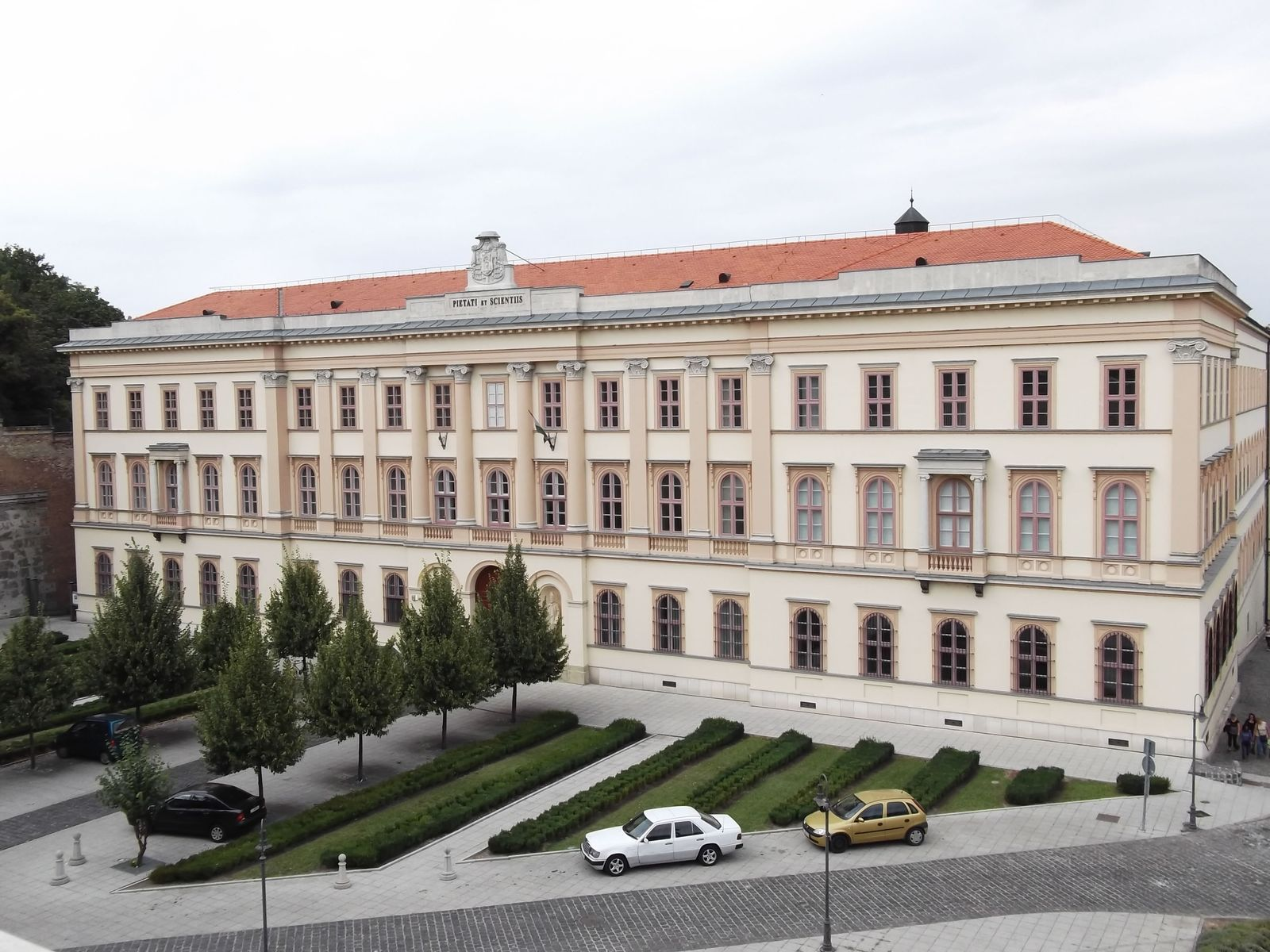 Szent Adalbert Központ